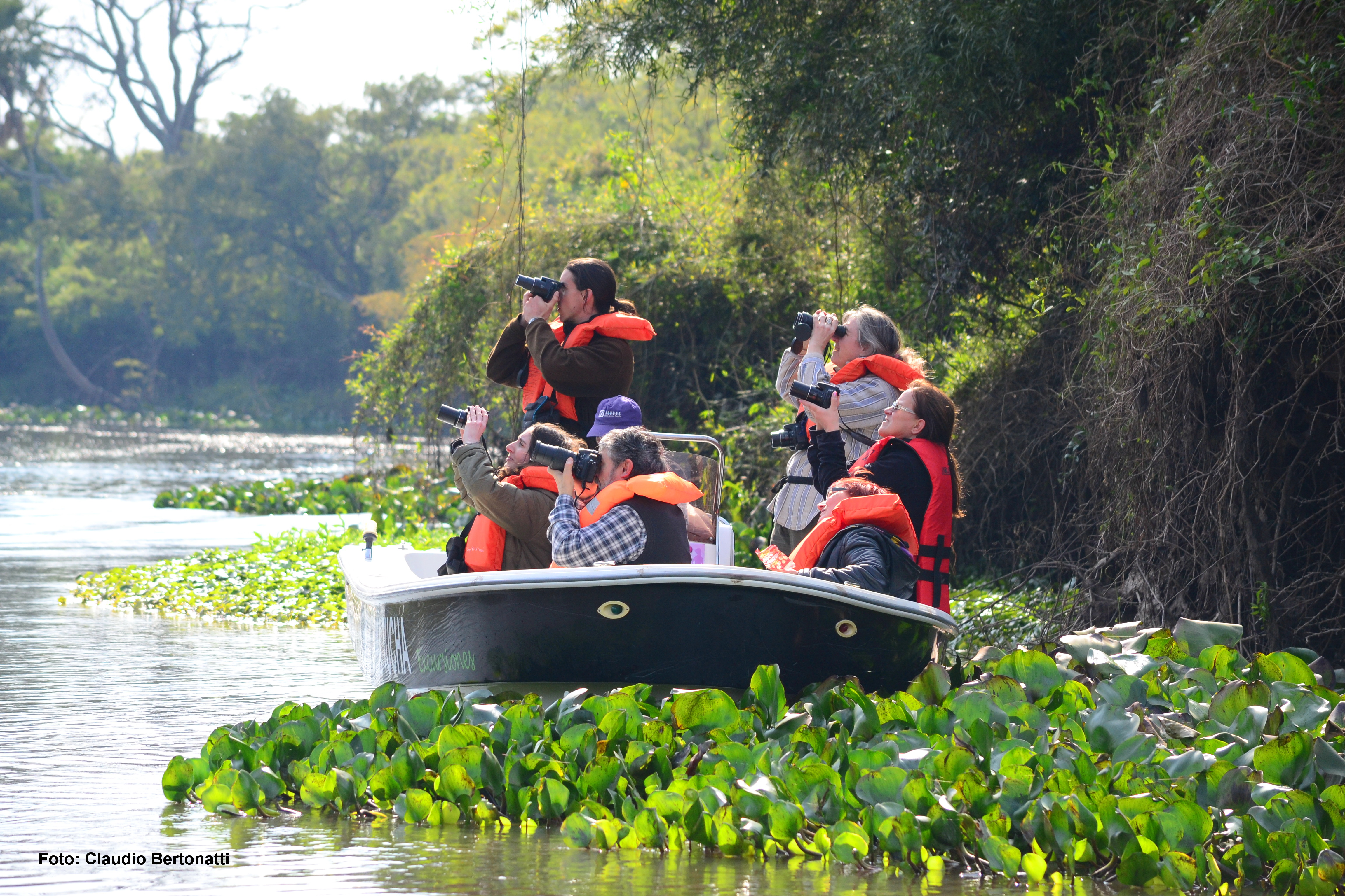 Grupo de ecoturistas de Mazama (Destinos naturales y culturales) observando monos carayá en el Sitio Ramsar Jaaukanigás (Provincia de Santa Fe, Argentina).